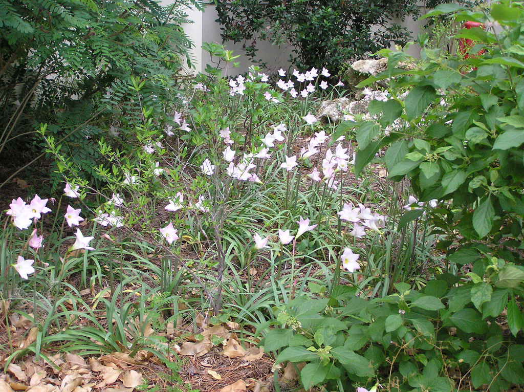 rain lilies